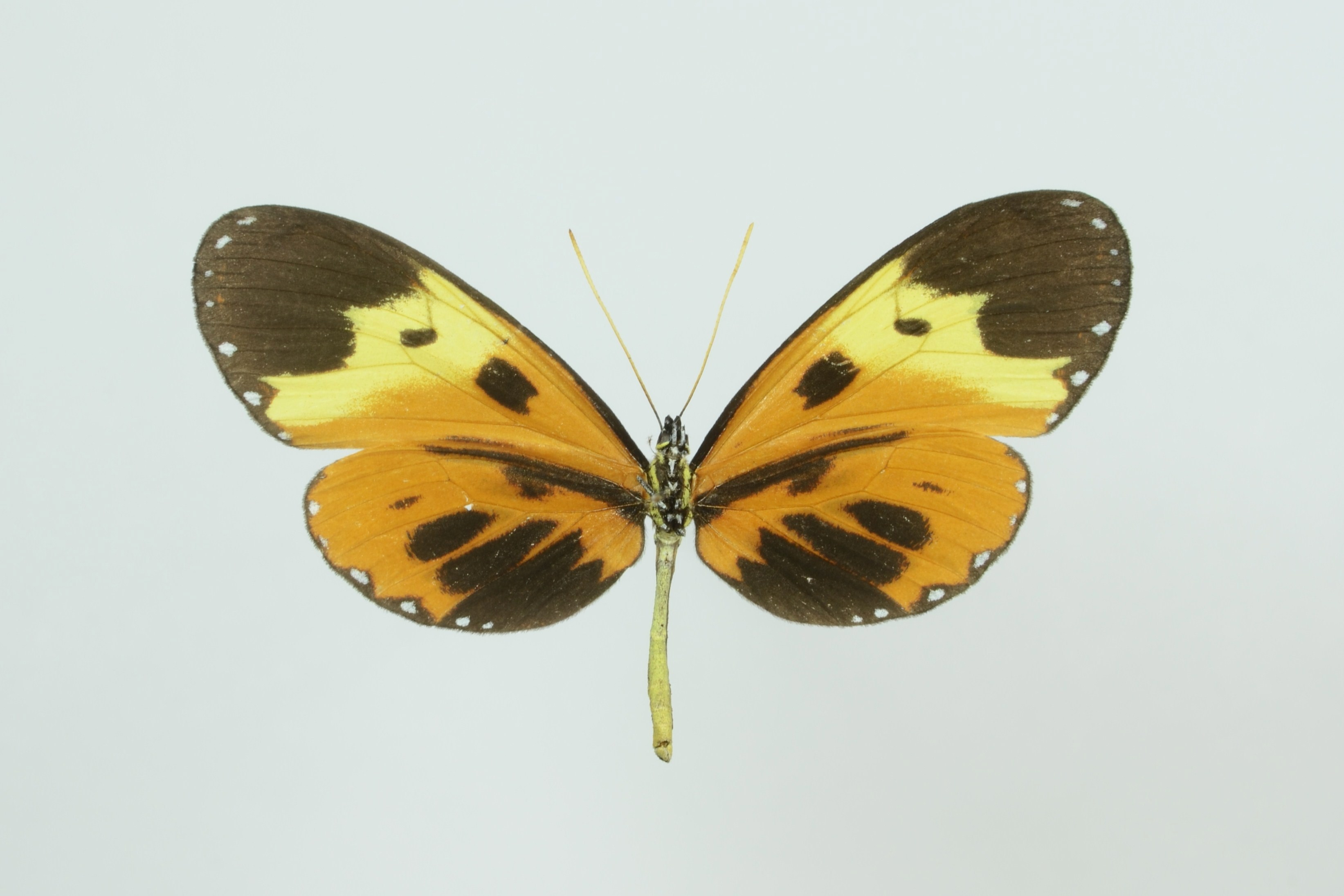 Napeogenes larina ventral Ecuador